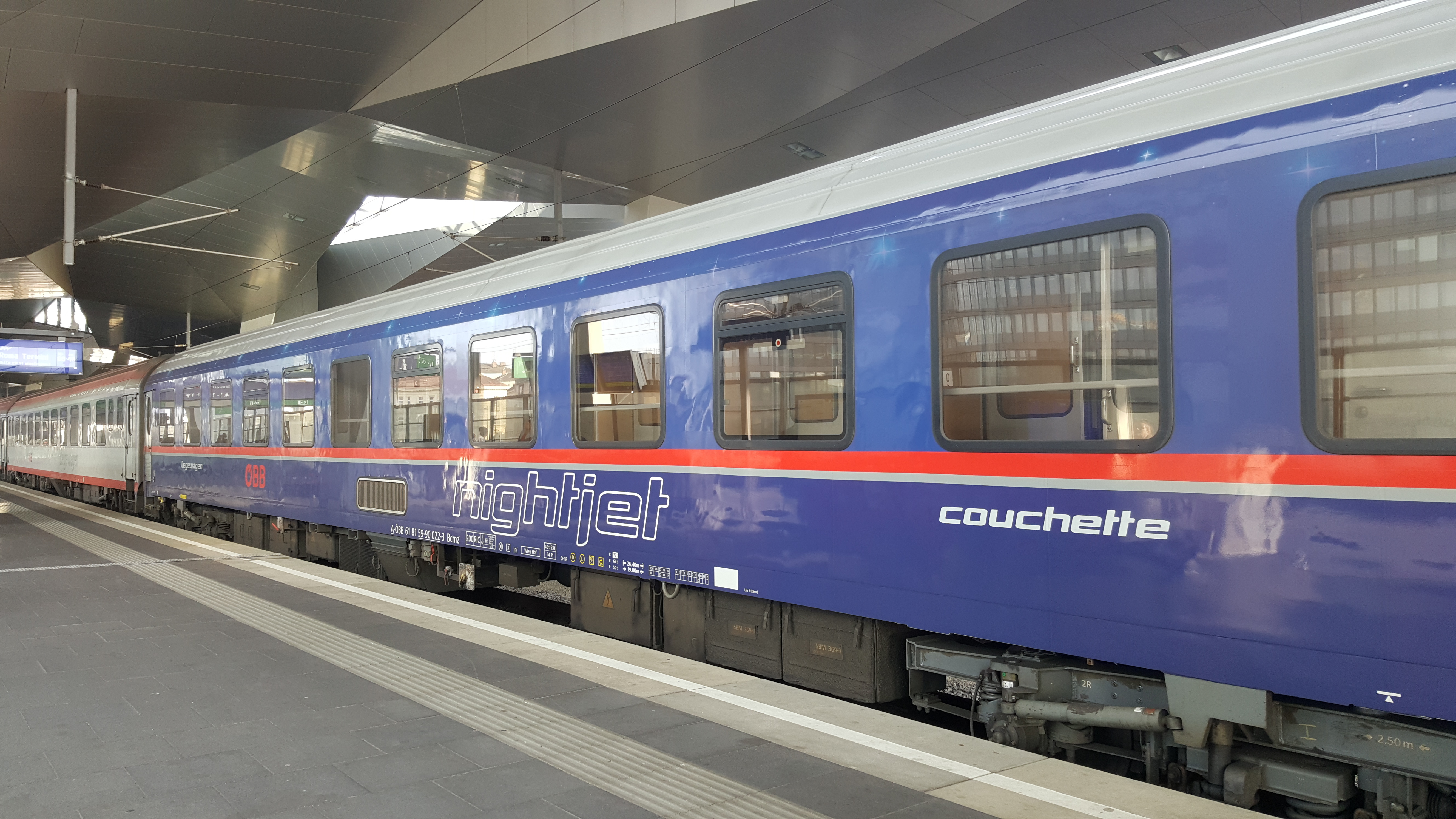 Nightjet im Wiener Hbf